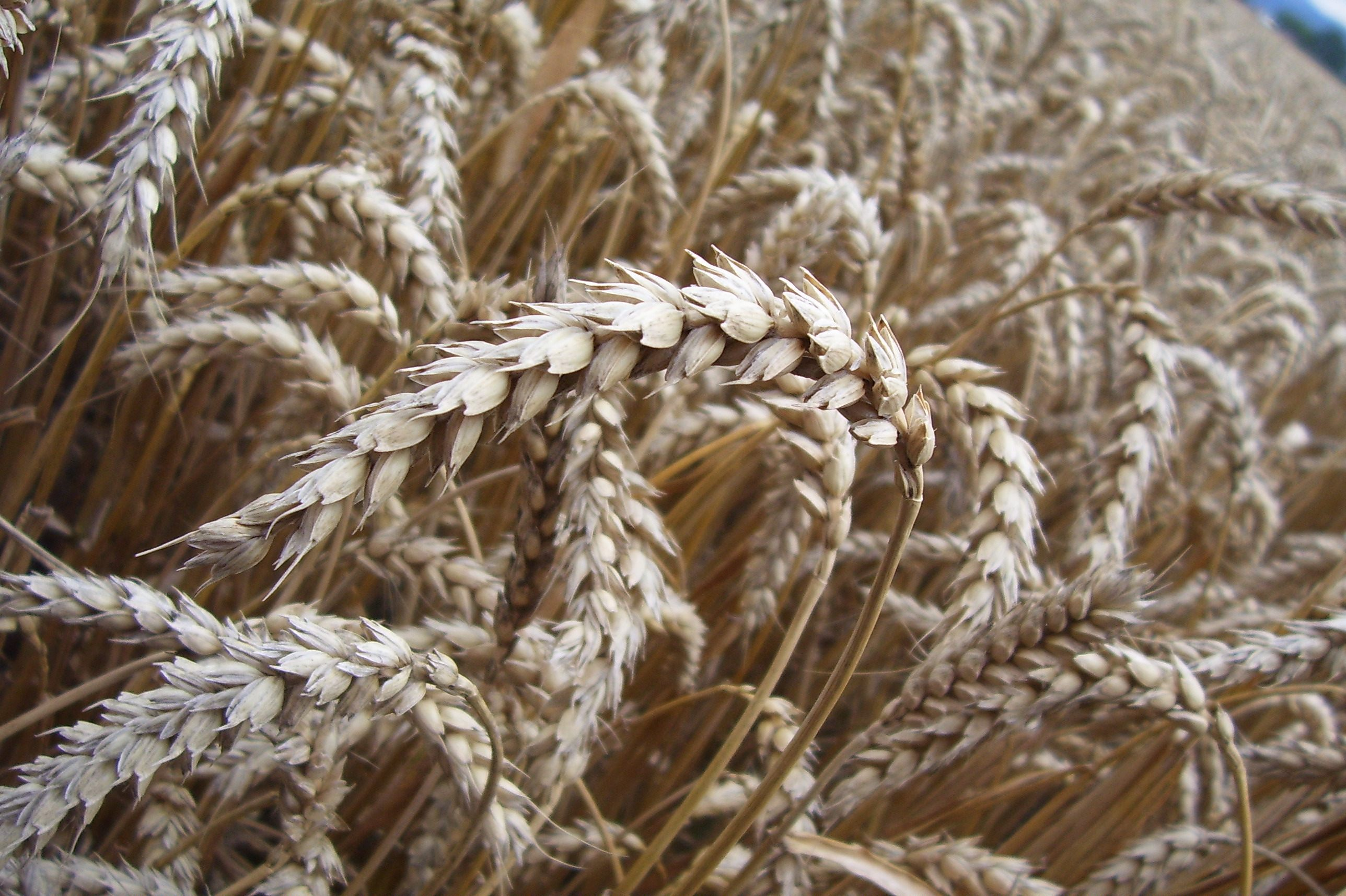 Pszenica